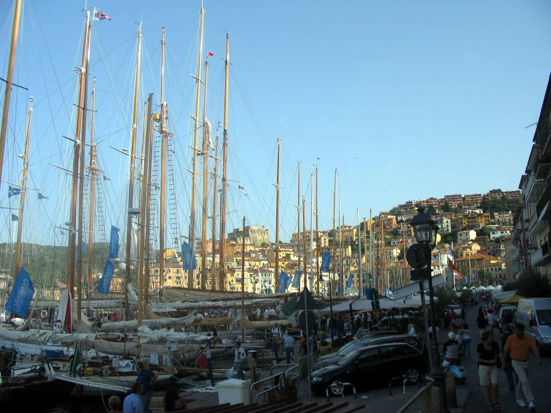 Porto Santo Stefano, Toscana, Italia